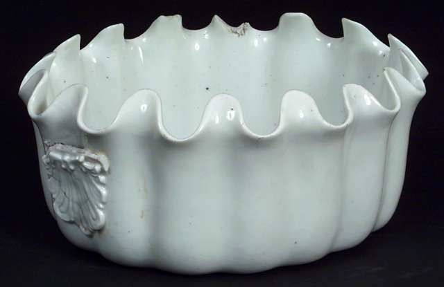 Vinglasskjøler i keramikk fra 1700-tallet. Lengde 28 cm. Foto Anne-Lise Reinsfelt / Norsk Folkemuseum, NF.1977-0959.